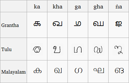 ka, kha, ga, gha, ṅa in 3 scripts: Grantha, Tulu, Malayalam